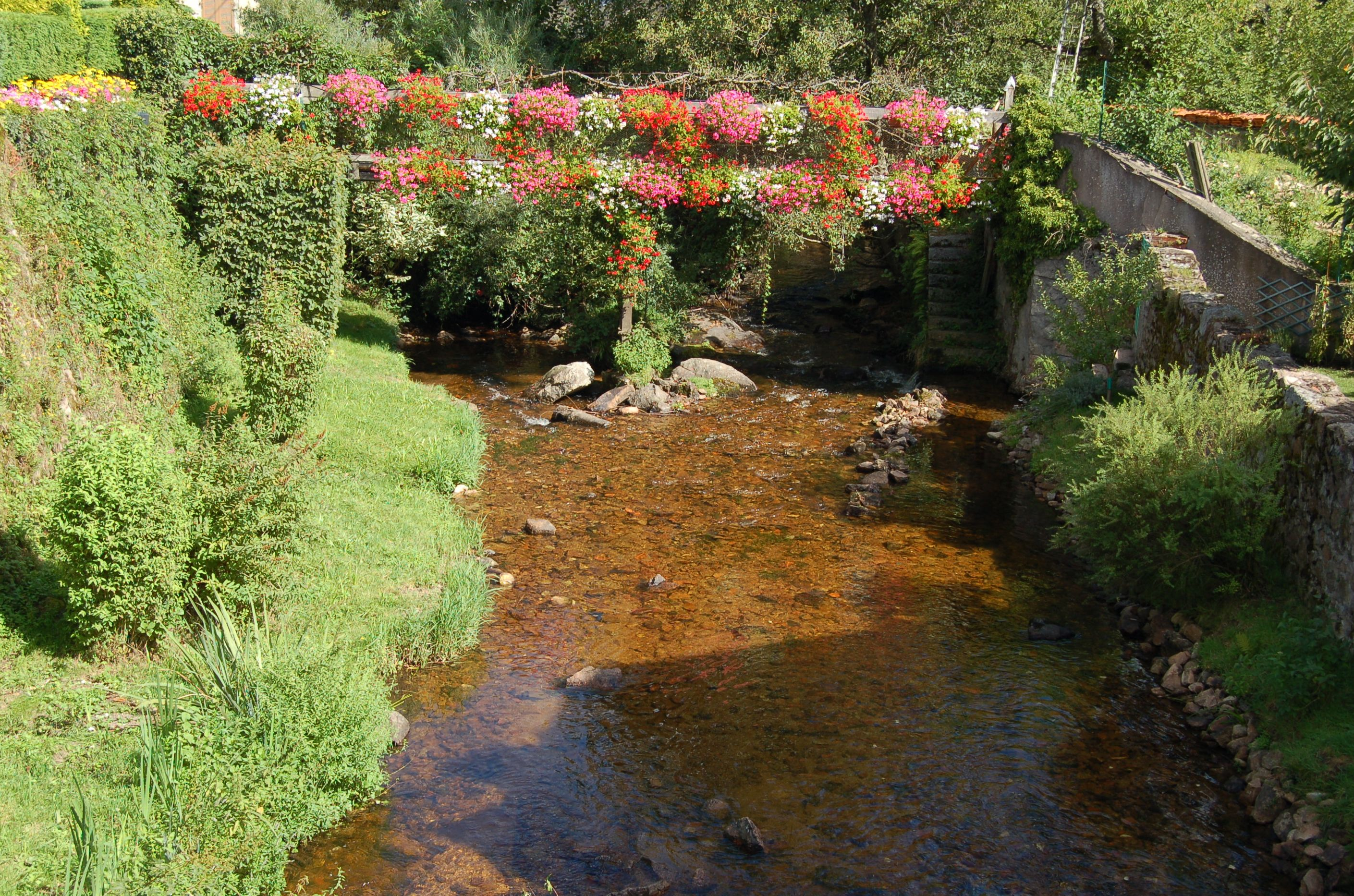 Rivière Barbenan ( bourg d'Arfeuilles)